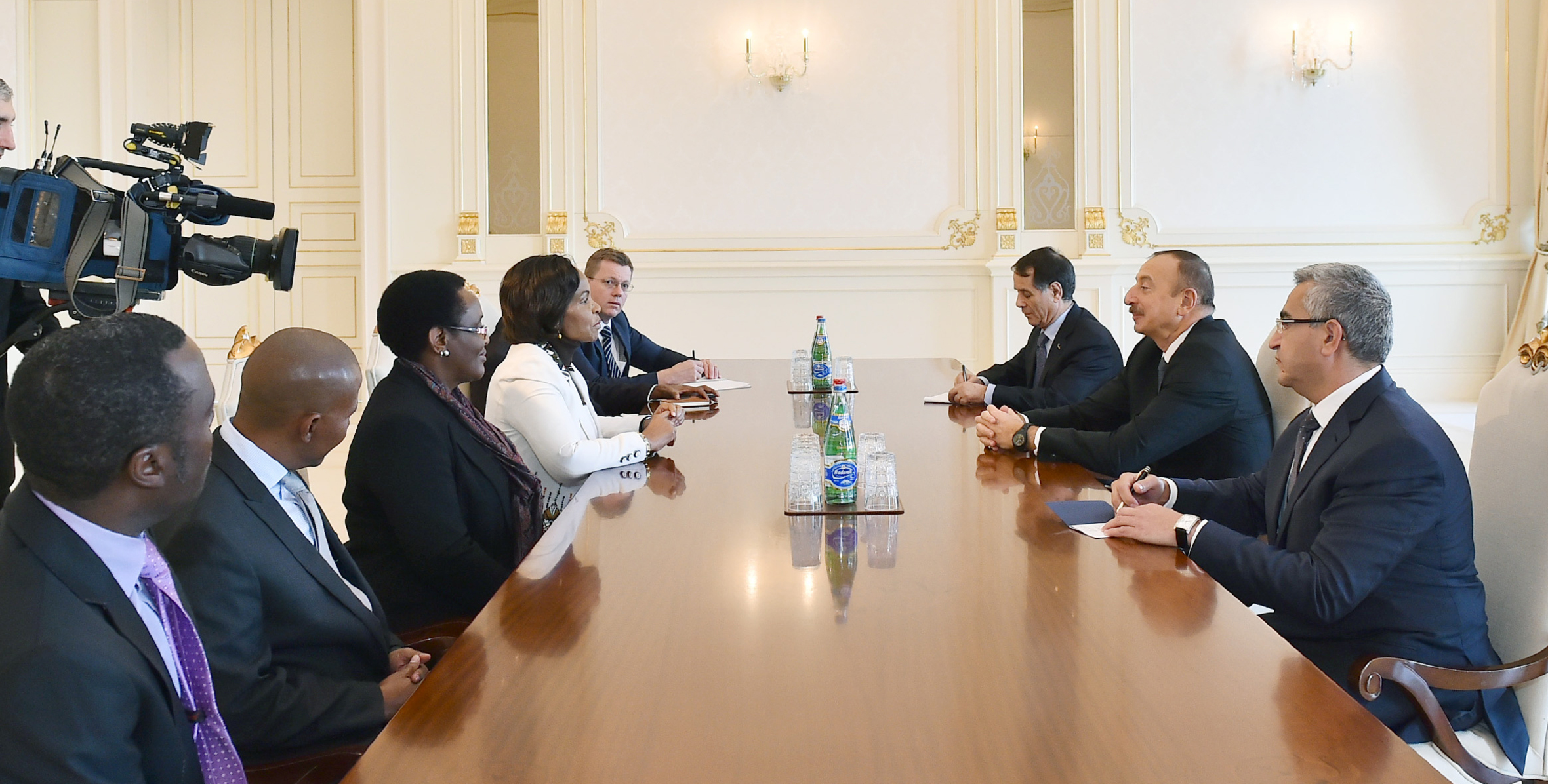 Prezident İlham Əliyev Cənubi Afrika Respublikasının beynəlxalq əlaqələr və əməkdaşlıq naziri xanım Maite Nkoana-Maşabanenin başçılıq etdiyi nümayəndə heyətini qəbul edərkən